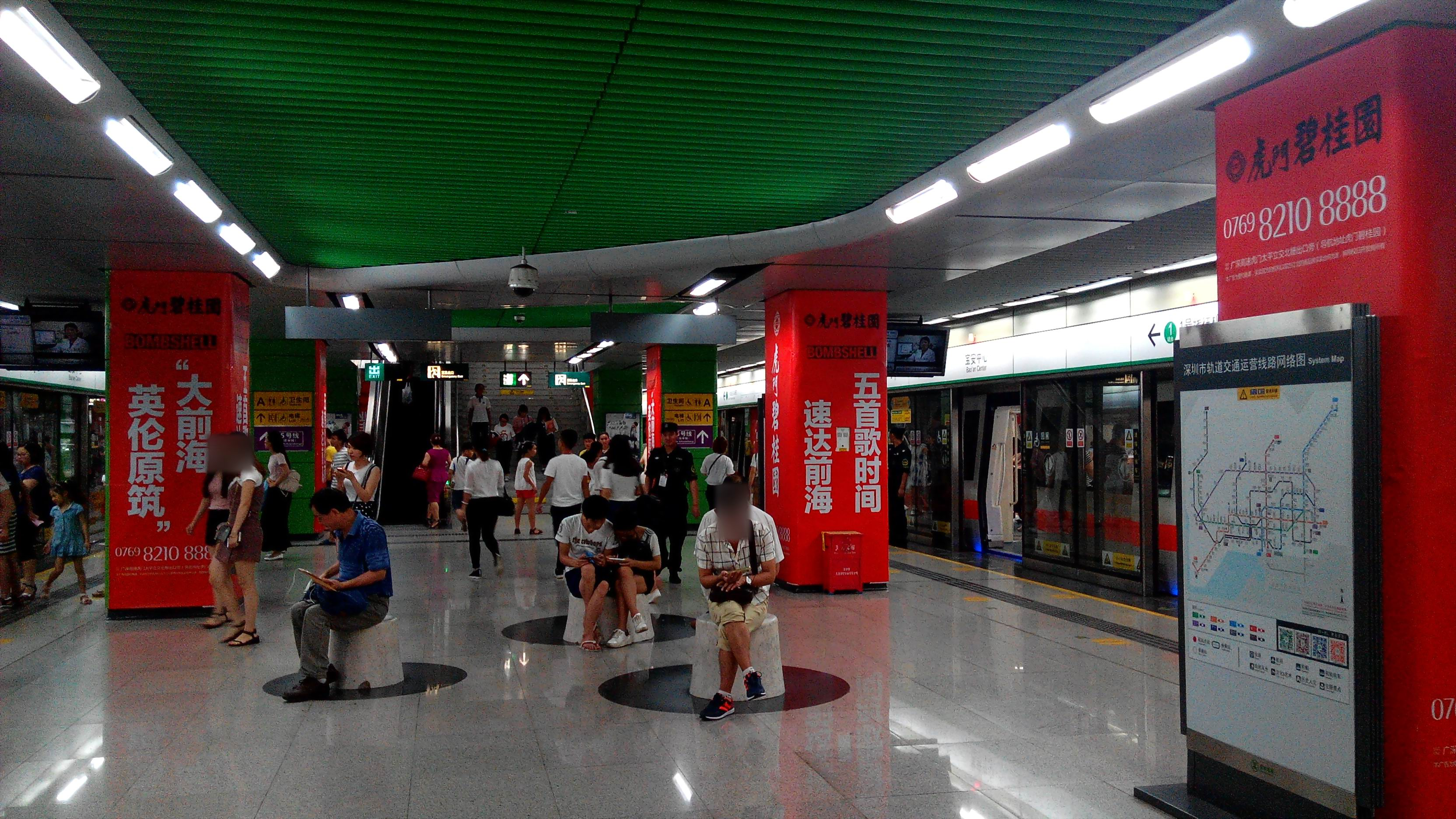 深圳地铁1号线 宝安中心站 站台